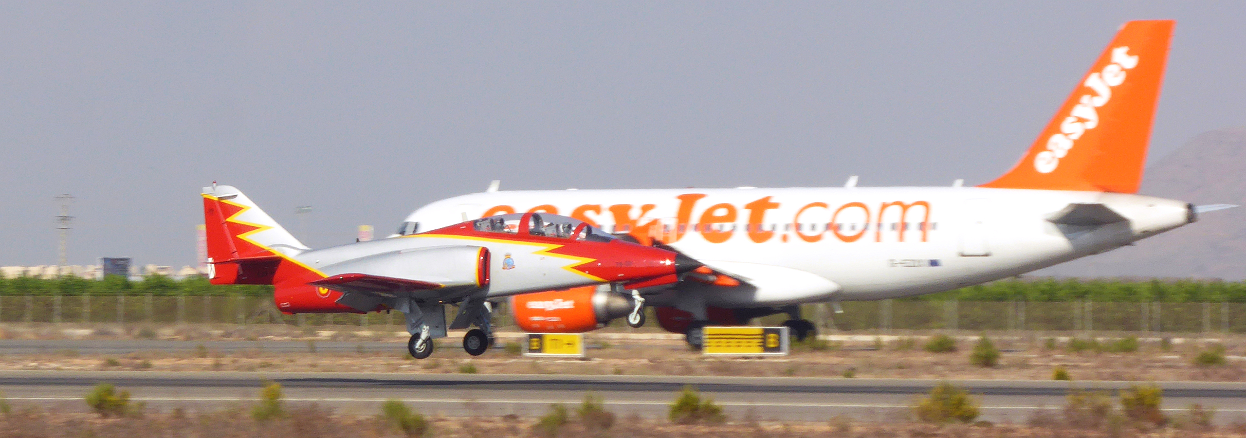 Militärische CASA C 101 Aviojet der Patrulla Águila beim Landeanflug und ziviler Airbus von easyJet auf Taxiway going to start am Flughafen Murcia-San Javier Region Murcia Spanien - Foto Wolfgang Pehlemann P1120497